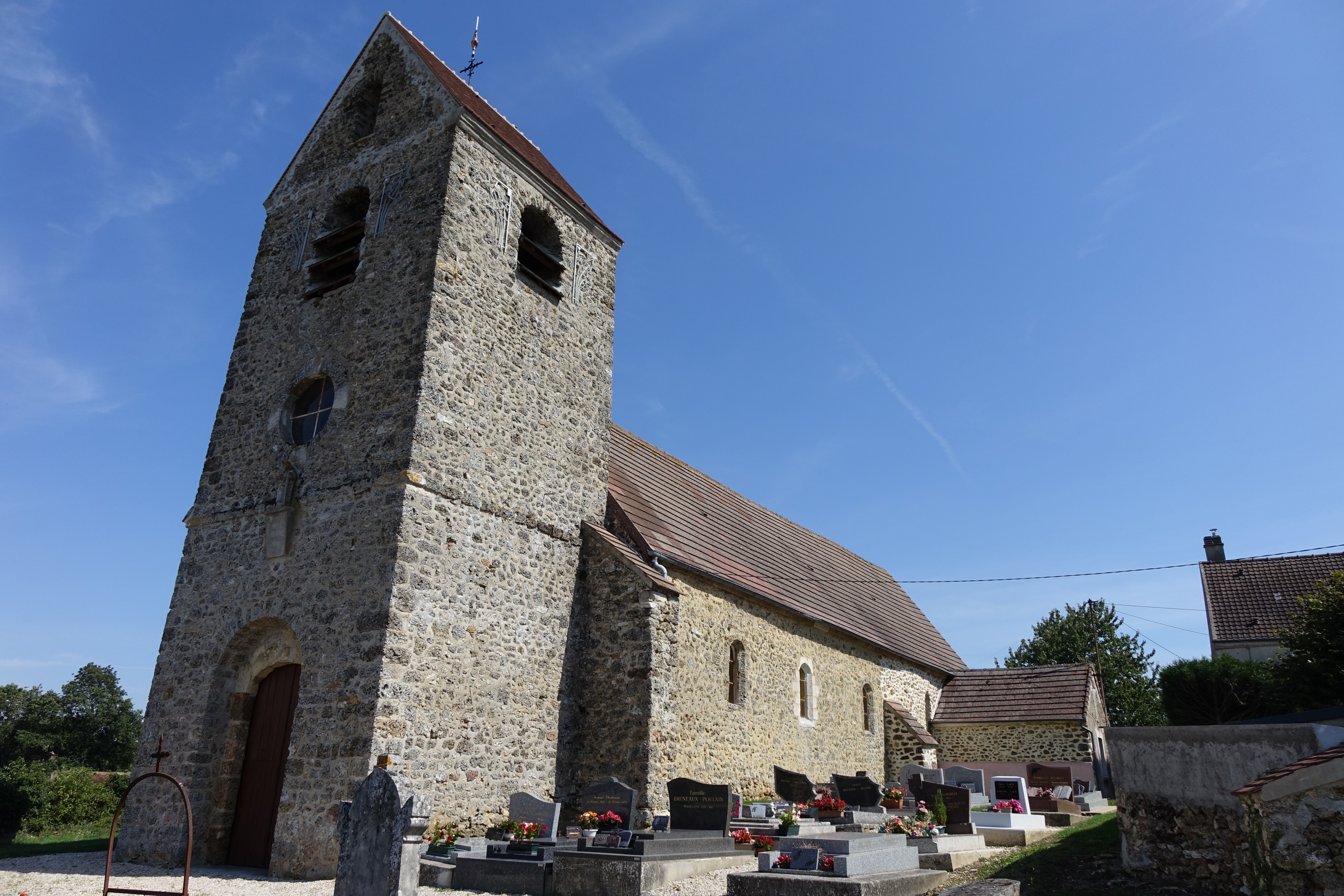 Église de Ronchères, Aisne, France